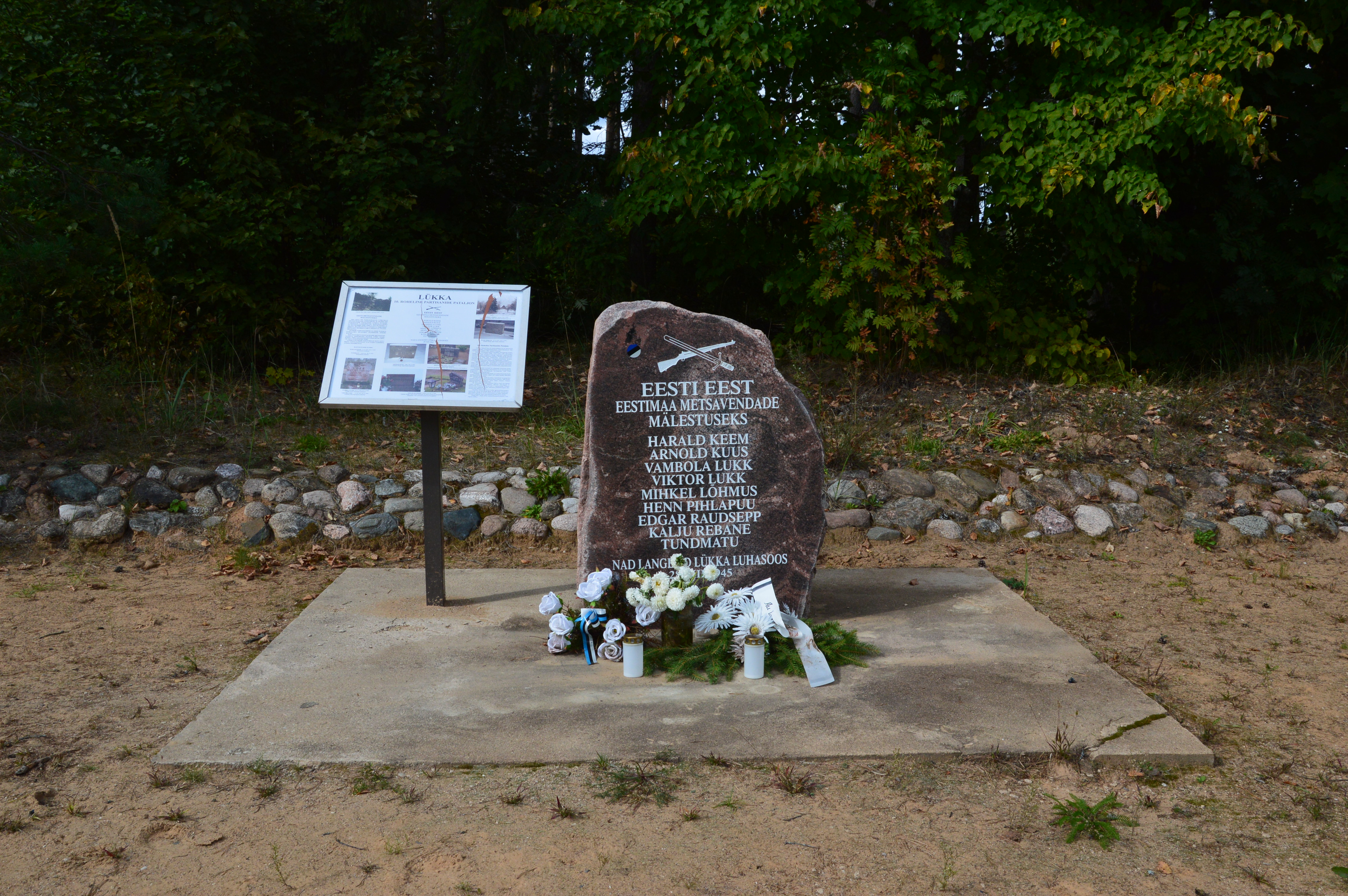 Mälestuskivi Lükka punkrilahingus langenud metsavendadele Võru-Mõniste-Valga tee ääres.